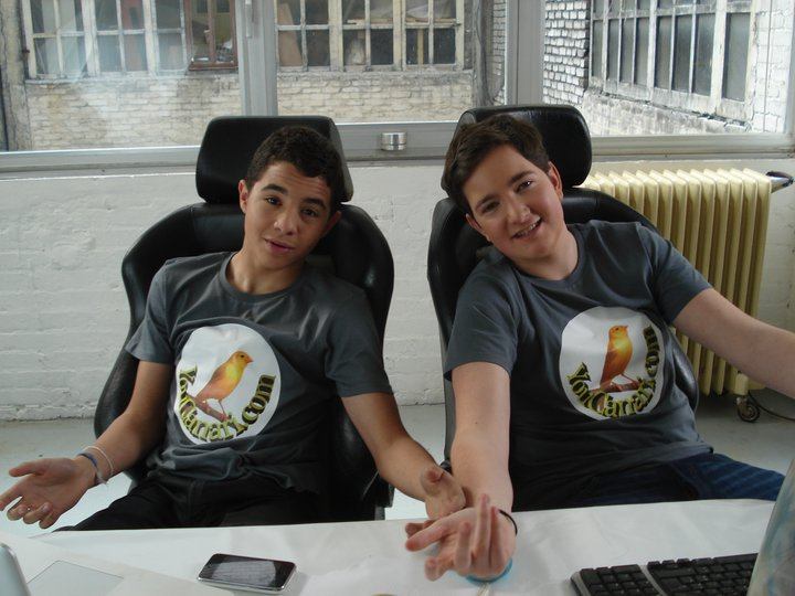 Samy Seghir et Jérémy Denisty, les deux acteurs principaux de Plan Biz.